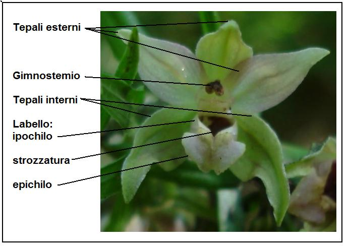 Epipactis helleborine